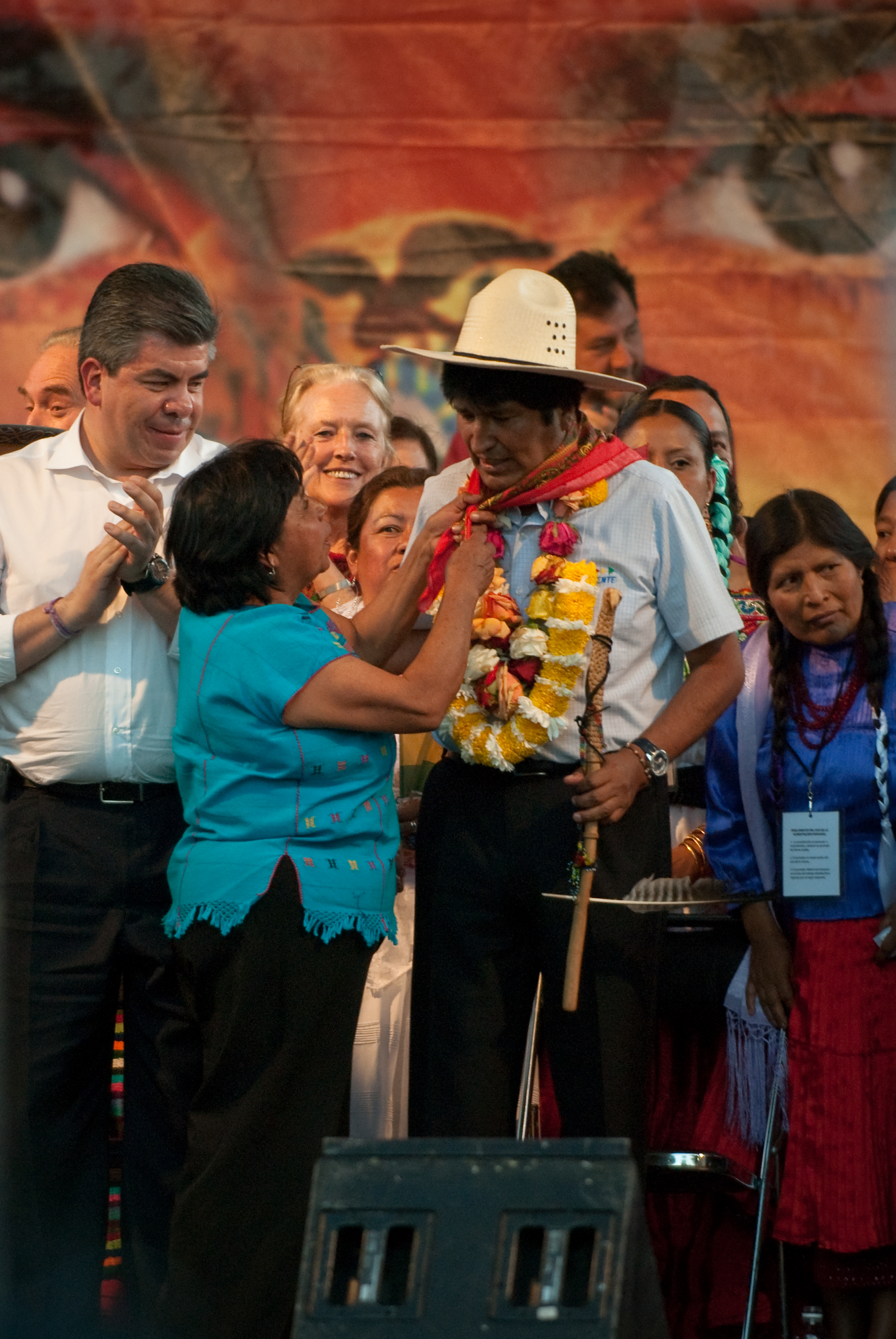 Trinidad Ramírez le impone a Evo Morales, Presidente del Estado Plurinacional de Bolivia, el paliacate que, junto con el machete, es símbolo de la lucha del movimiento de Atenco. Observa y aplaude el jefe delegacional de Coyoacán, Raúl Flores. A la izquierda del Presidente, Felicia, traductora. Trinidad es activista del Frente de Pueblos en Defensa de la Tierra (FPDF) en Atenco y esposa de Ignacio del Valle, actualmente preso por "ataque a las vías de comunicación" cuando la gente del FPDT bloqueó una carretera para impedir la construcción de un aeropuerto en sus tierras. "Pronto México se liberará"